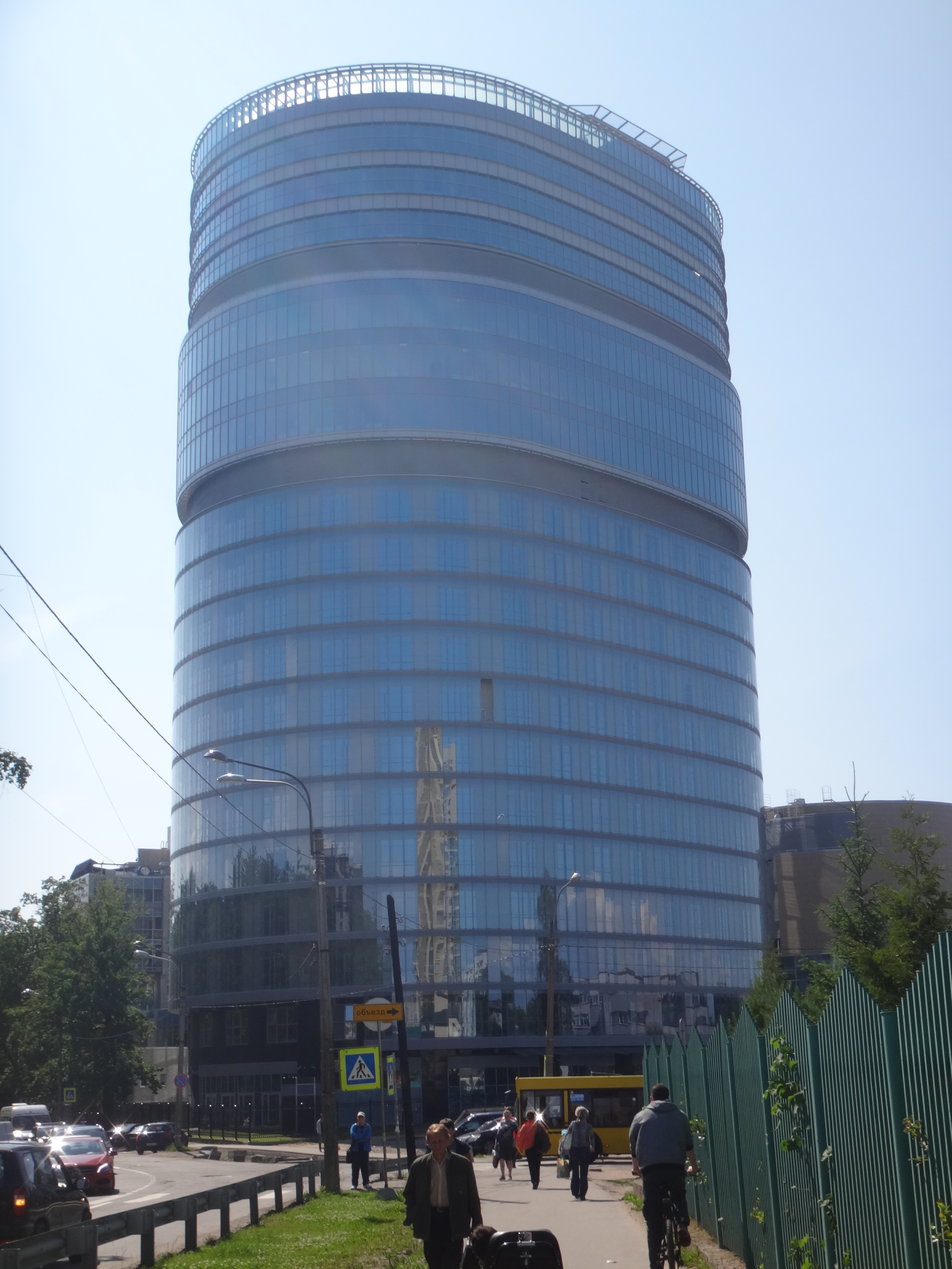 Научный центр клиники Алмазова